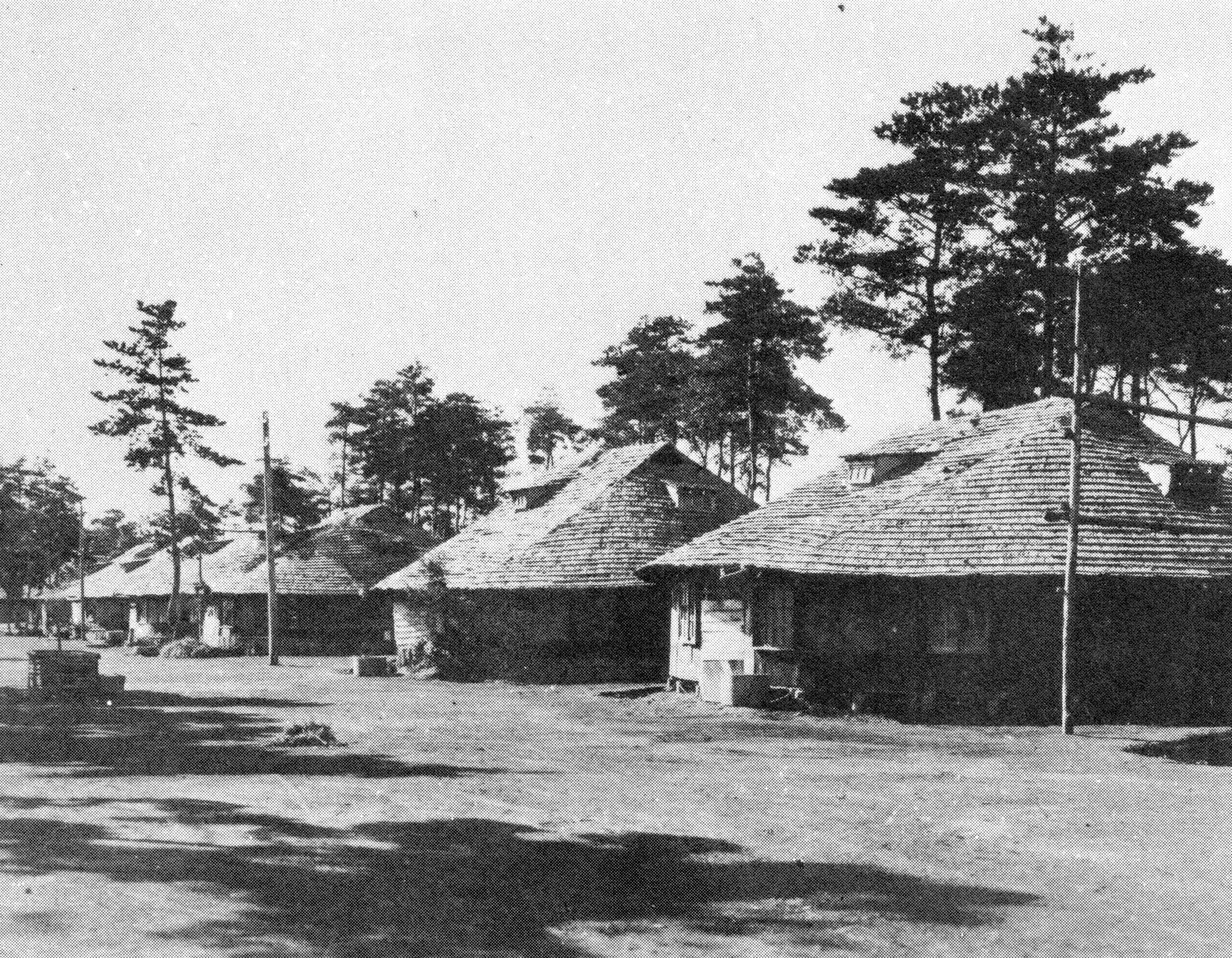 満蒙開拓青少年義勇軍の内原訓練所の日輪兵舎。